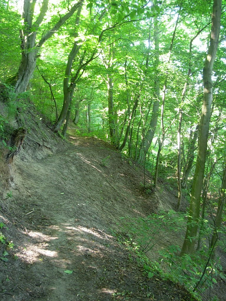 Zbocze rynny jezior byszewskich, w pobliżu jeziora Wierzchucińskiego Dużego